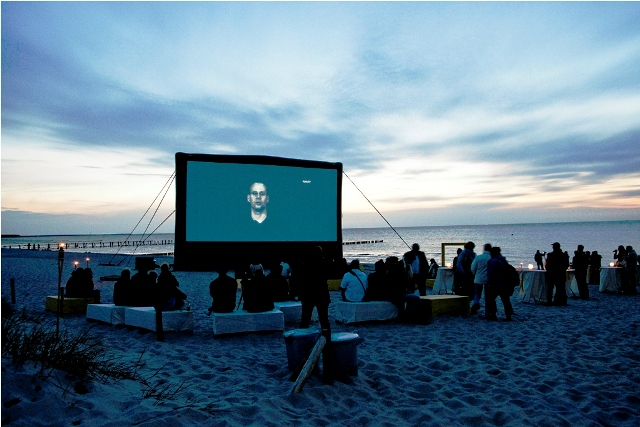 Fotofestival in Zingst mit aufblasbarer Leinwand (AIRSCREEN)